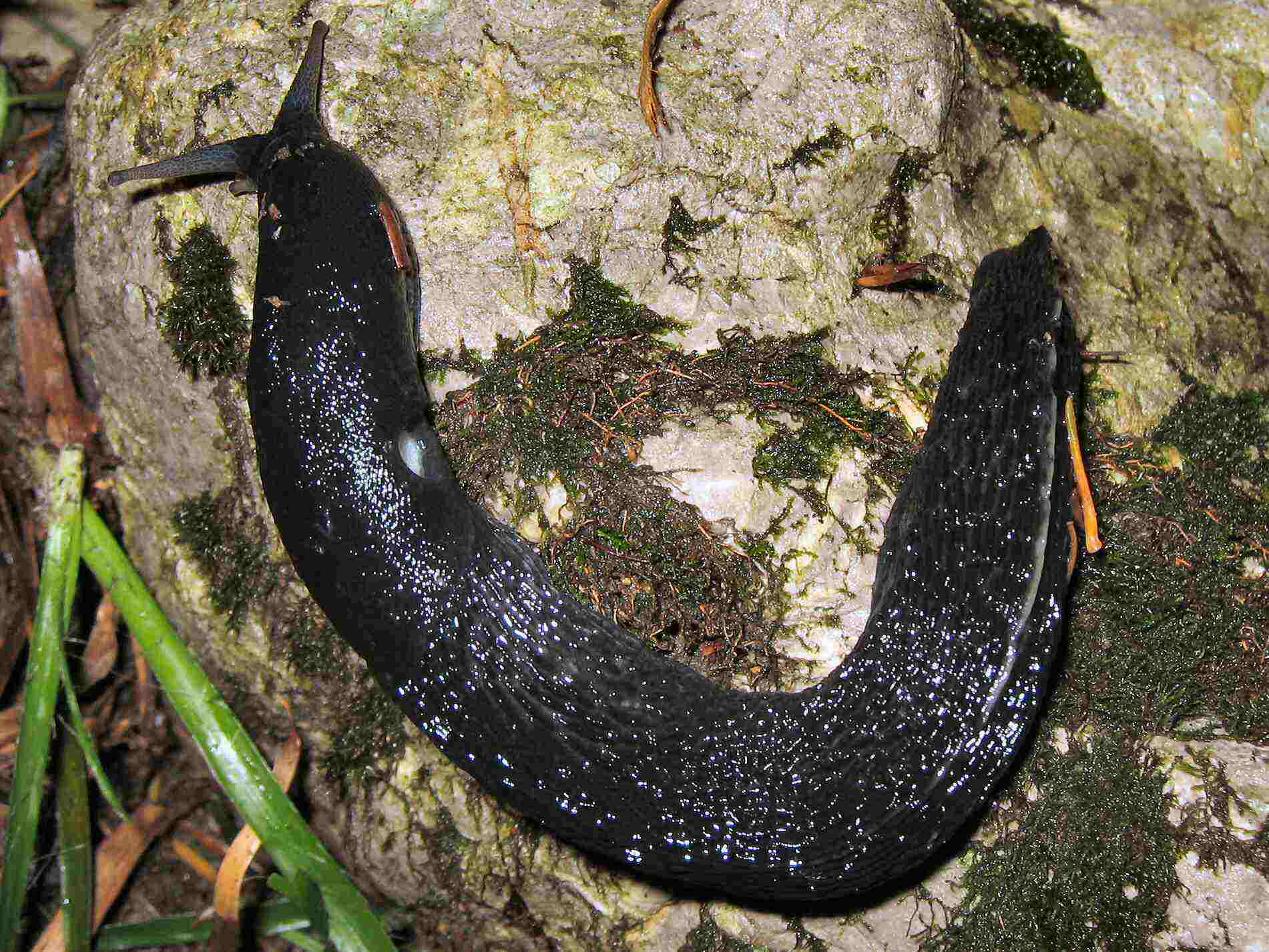 Schwarzer Schnegel (Limax cinereoniger), 16cm lang, weißer Kiel sichtbar, Plona Schweiz.